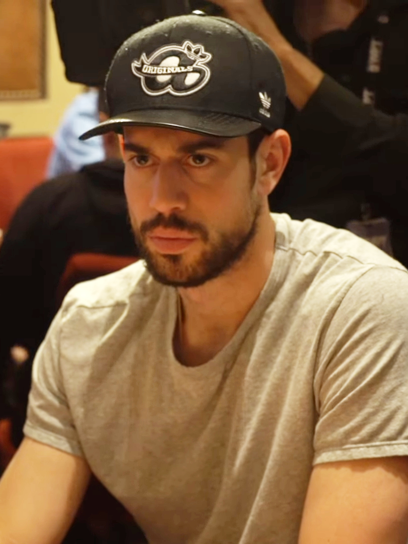 Nick Schulman beim WPT Bellagio High Roller